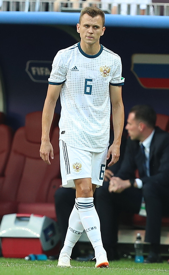 История творится на наших глазах! Россия бьет Испанию в серии пенальти